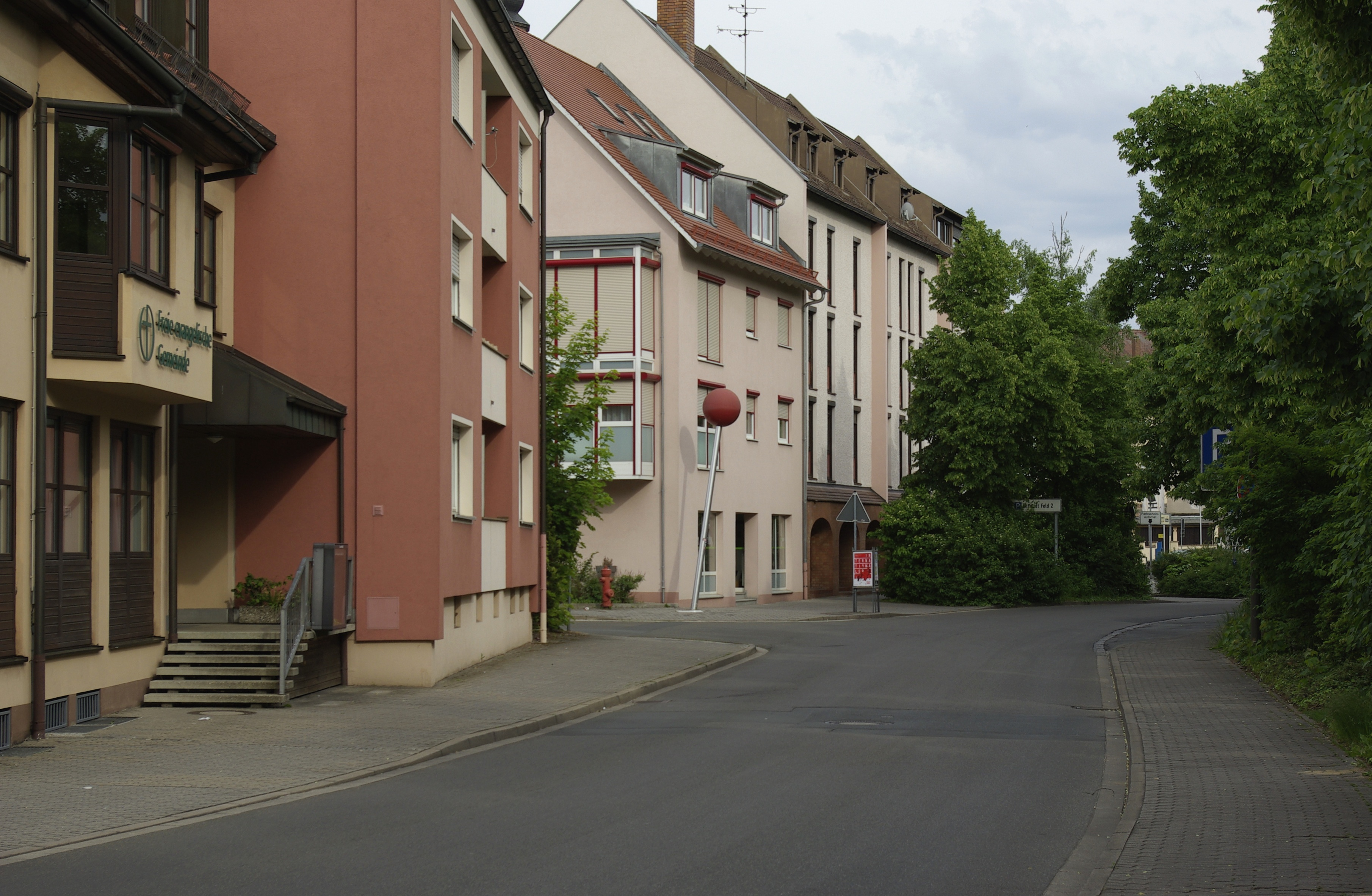 Erlanger Stecknadel des Projekts Denkmal-Objekte der Künstlerin Isi Kunath. Standort 1: Veste Erlangen am Fuchsengarten.